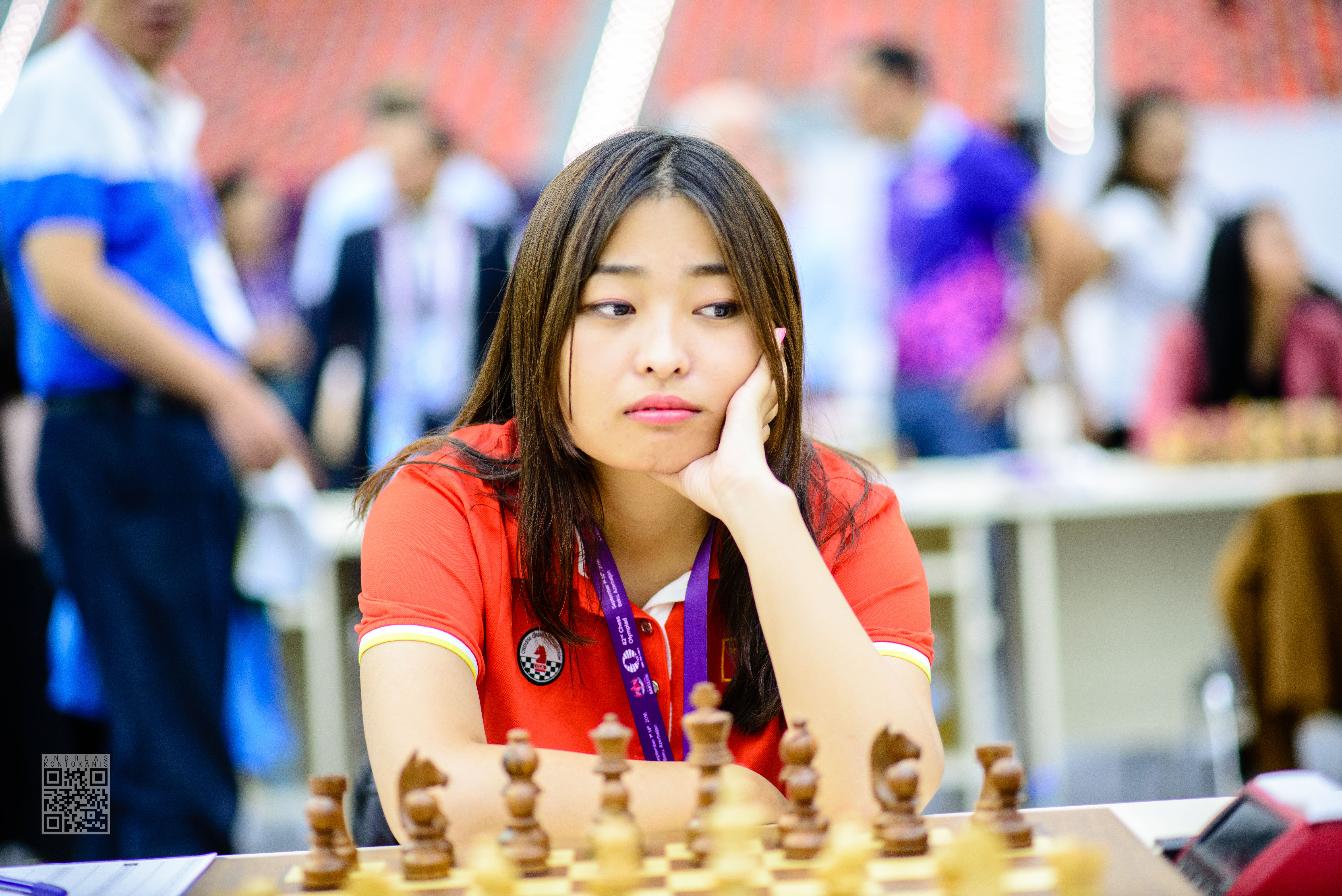 Ju Wenjun